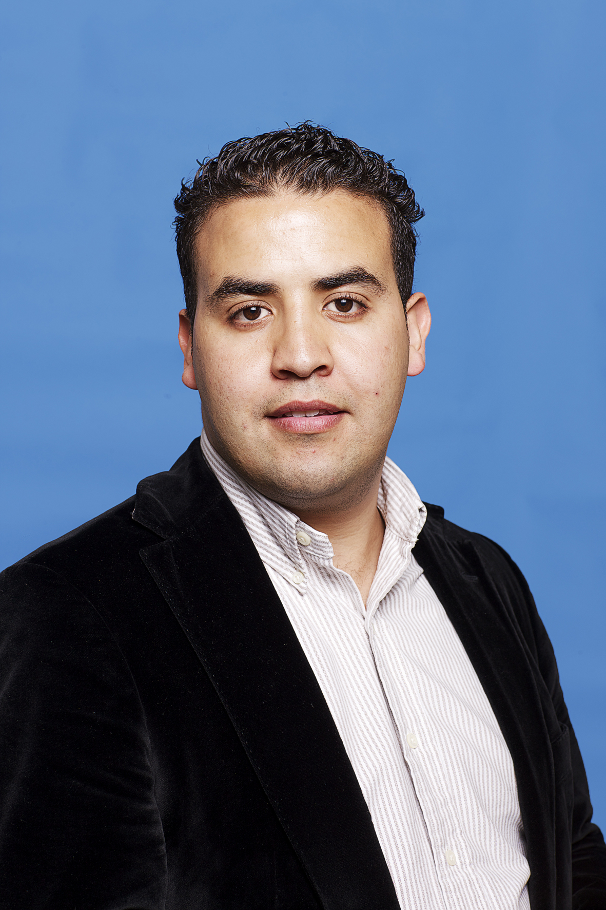 Mohammed Mohandis, Kandidaat-Kamerlid. Foto: Lex Draijer.